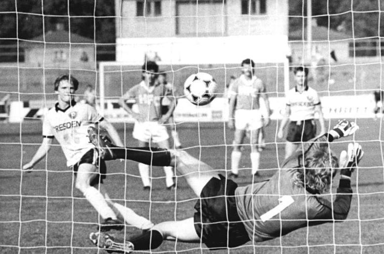 ADN-ZB-Häßler -10.9.88-kb- Dresden: Fußball- 1. Runde FDGB-Pokal- Dynamo Dresden II - HFC Chemie 1:2 (1:1)- Torhüter Adler entschied das Spiel für die Hallenser. Er hielt den Elf-Meter-Ball von Karsten Neitzel (l.).